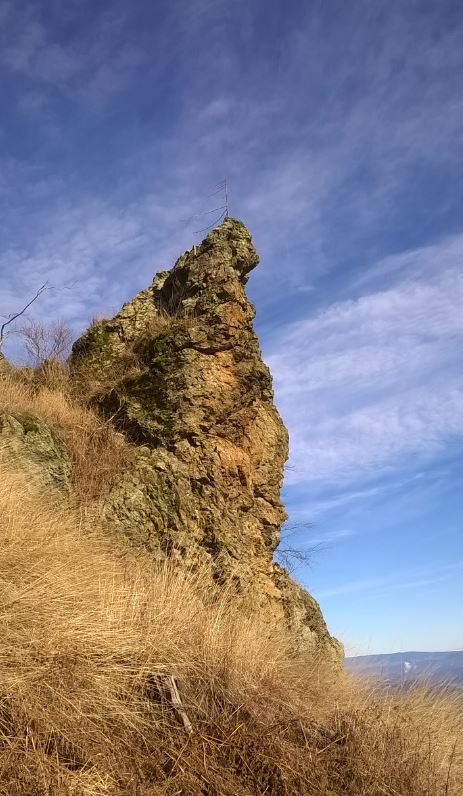 Skalni mož ob deželni meji